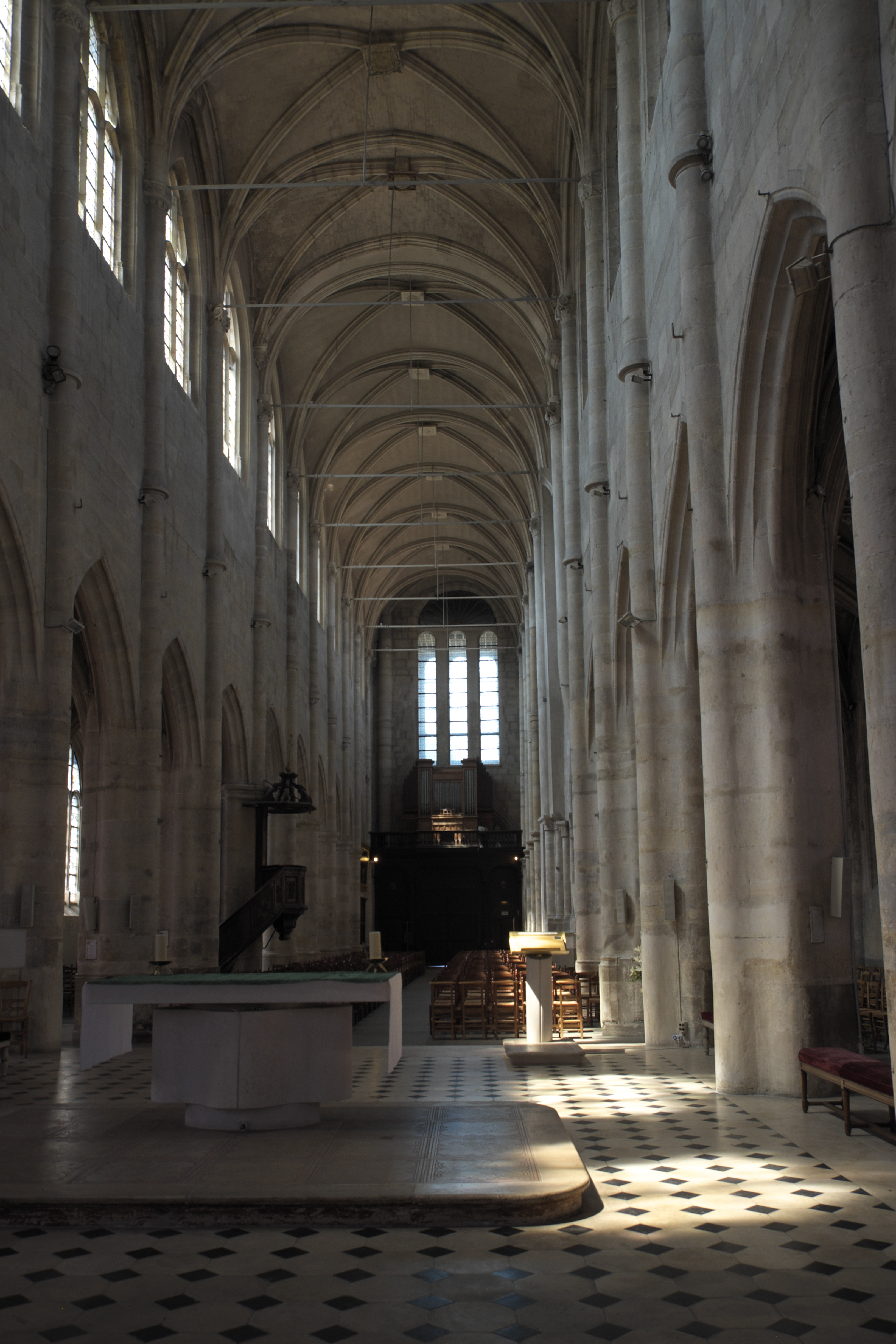 Katholische Pfarrkirche Saint-Pierre in Montfort-l'Amaury im Département Yvelines (Region Île-de-France/Frankreich), Innenraum